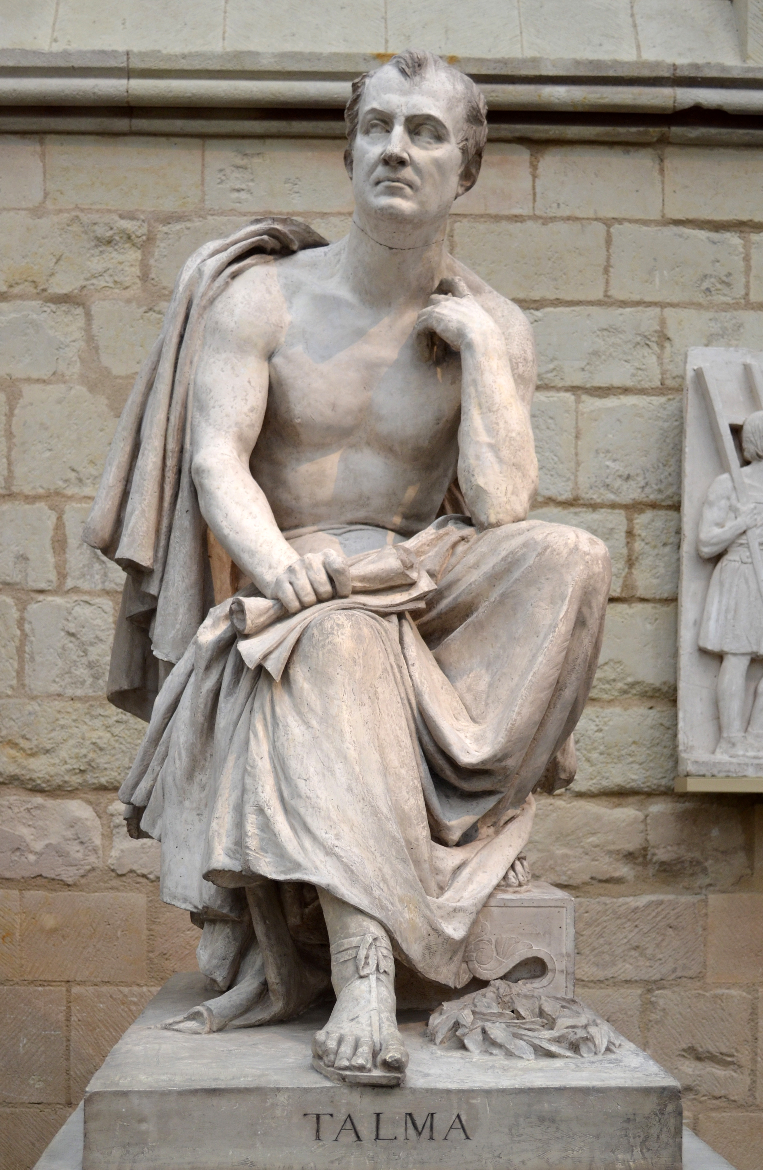 L'acteur Talma par David d'Angers, plâtre[1], musée David d'Angers, Angers (Maine-et-Loire) ↑ Notice de l'œuvre sur la base Joconde